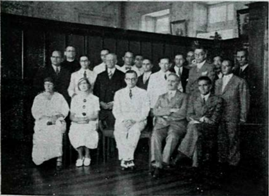 Fotografia tirada na Escola Nacional de Agronomia (atual Universidade Federal Rural do Rio de Janeiro) em 21/01/1936, momentos antes da Sessão Inaugural da Primeira Reunião de Fitopatologistas do Brasil.